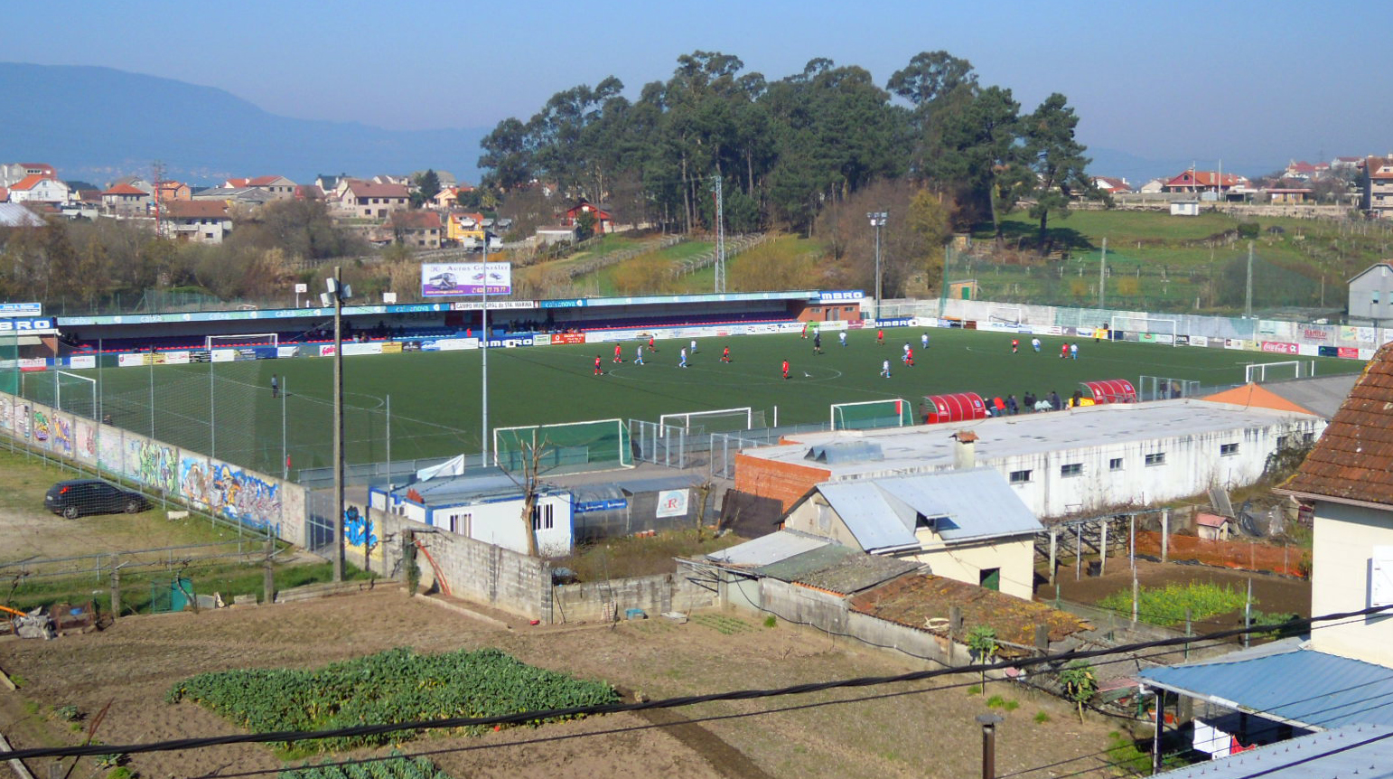 Estadio de Santa Mariña en Redondela, feudo do CD Choco.